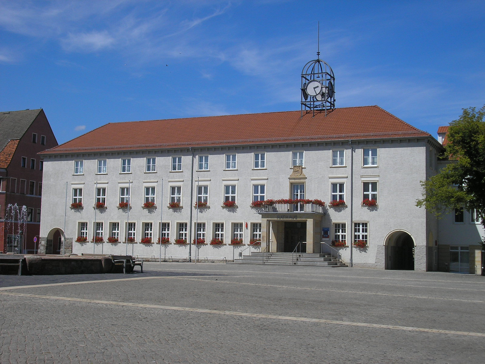 Das Rathaus in Anklam (Vorpommern).